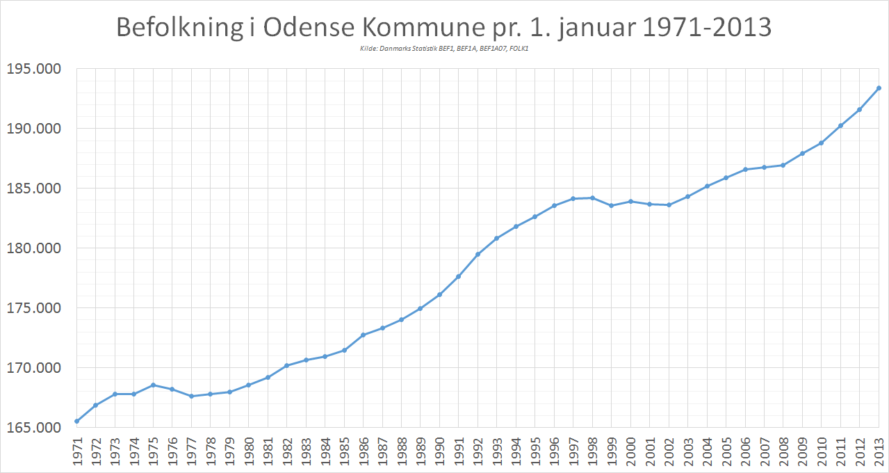 Befolkning i Odense Kommune pr. 1. januar, baseret på Danmarks Statistik tabeller BEF1, BEF1A, BEF1A07 og FOLK1